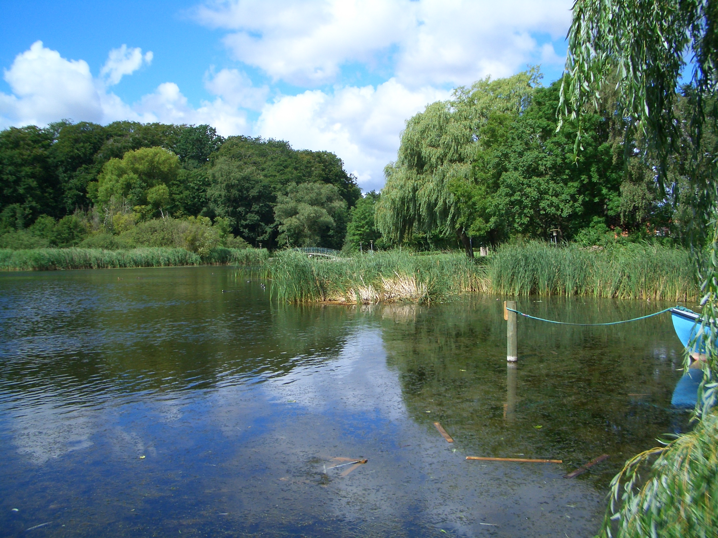 View of Søndersø (South lake) by Maribo